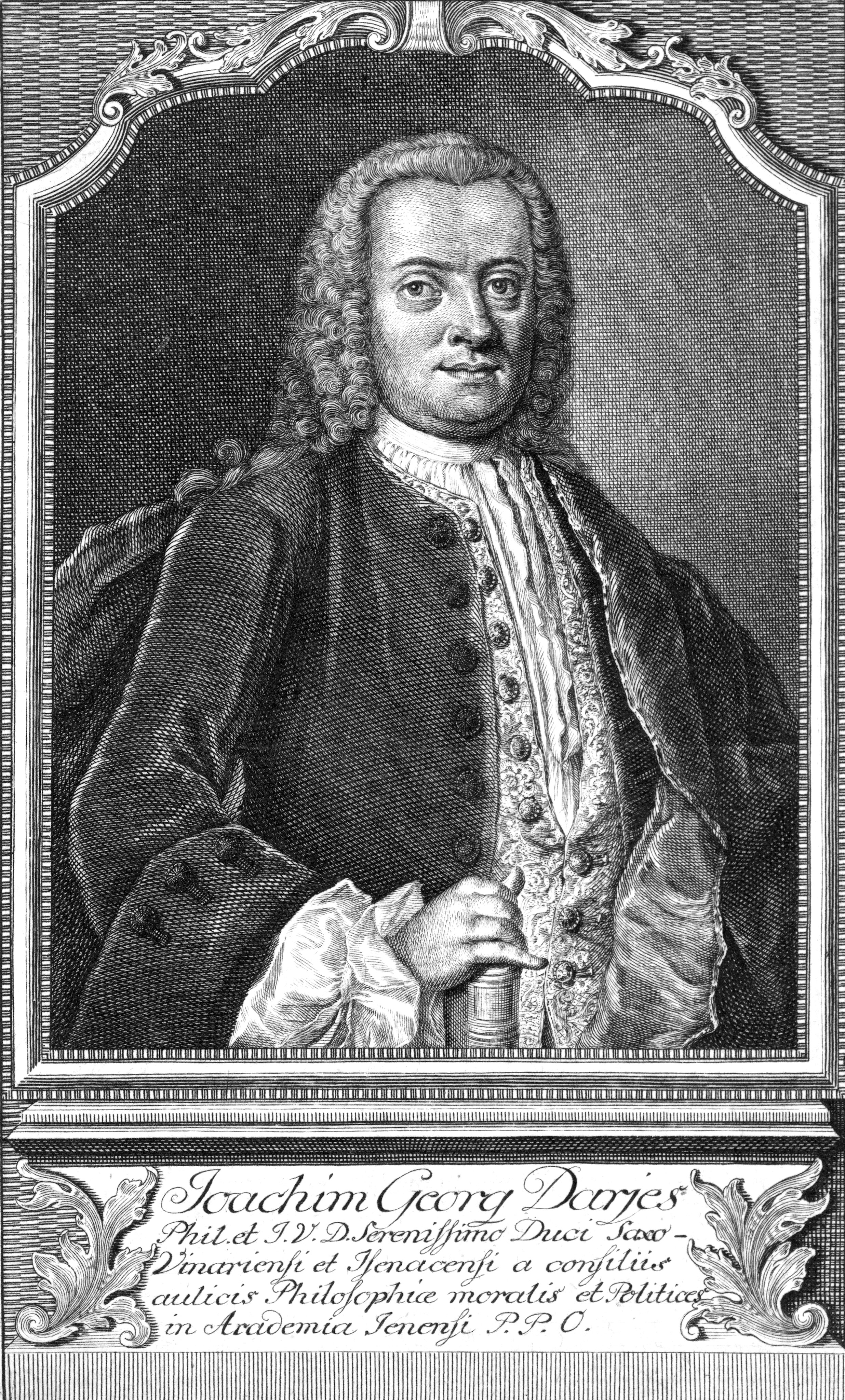 Gravure de Joachim Georg Darjes